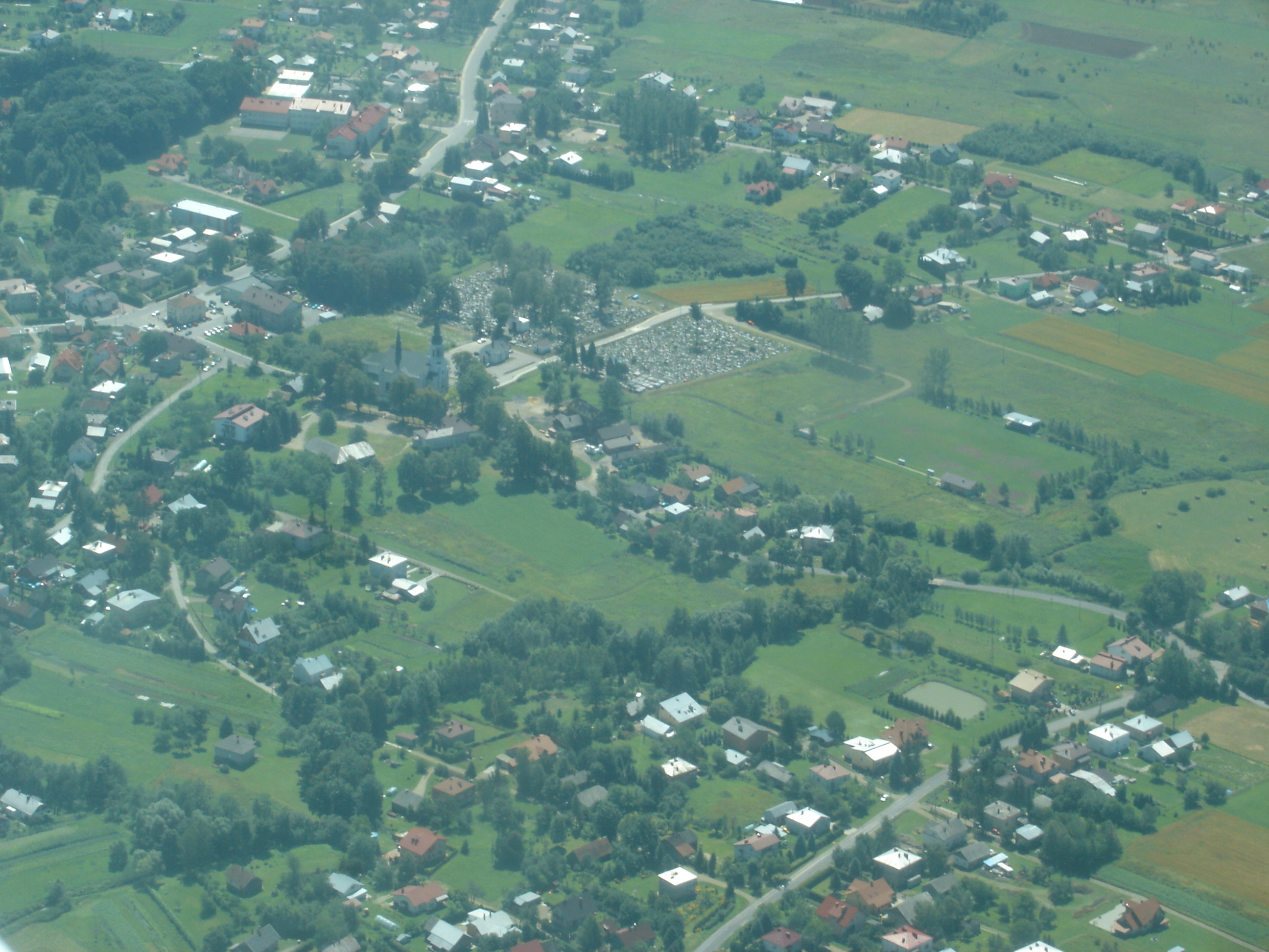 Zręcin